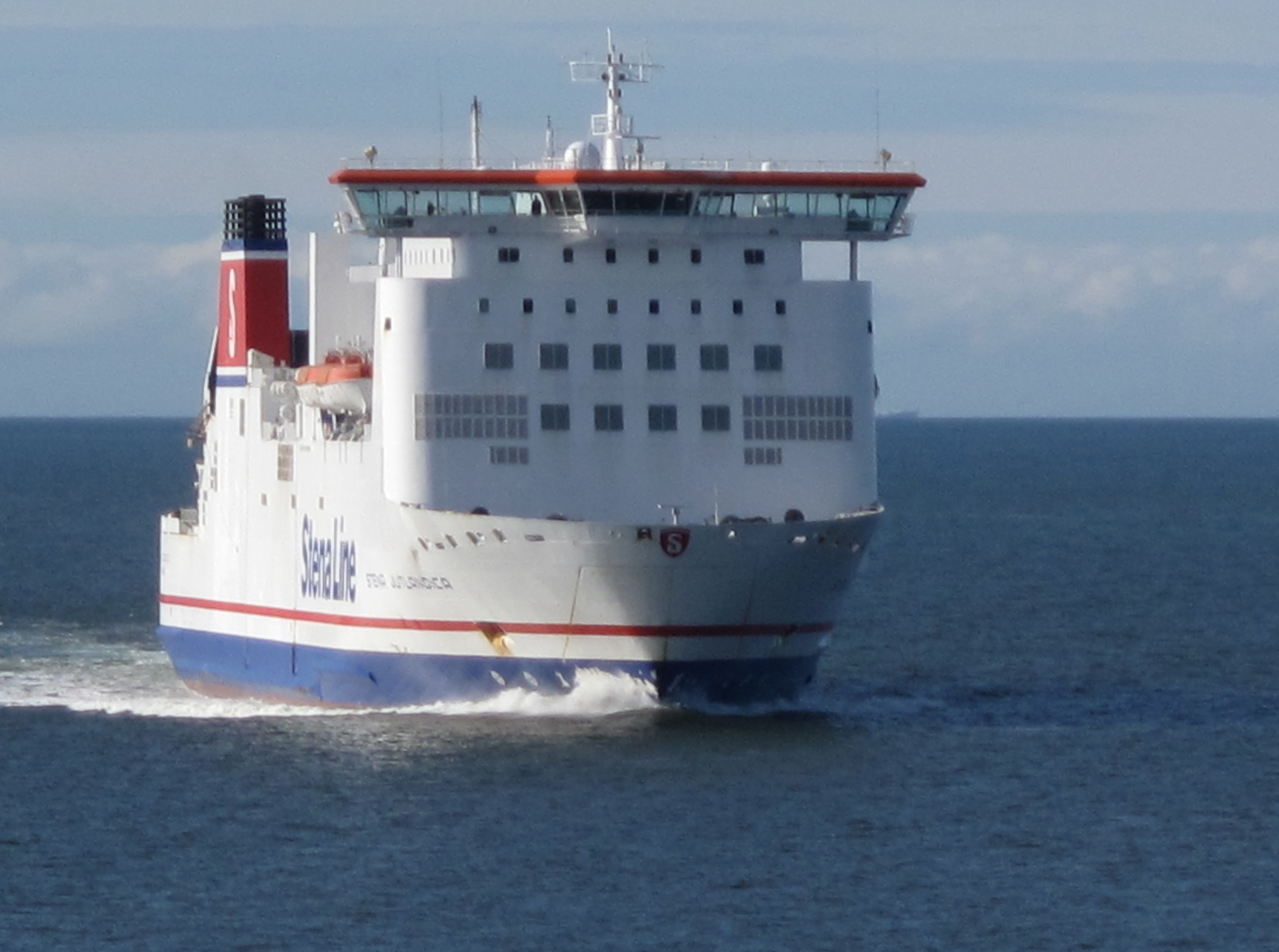 Stena Jutlandica, byggd 1996.